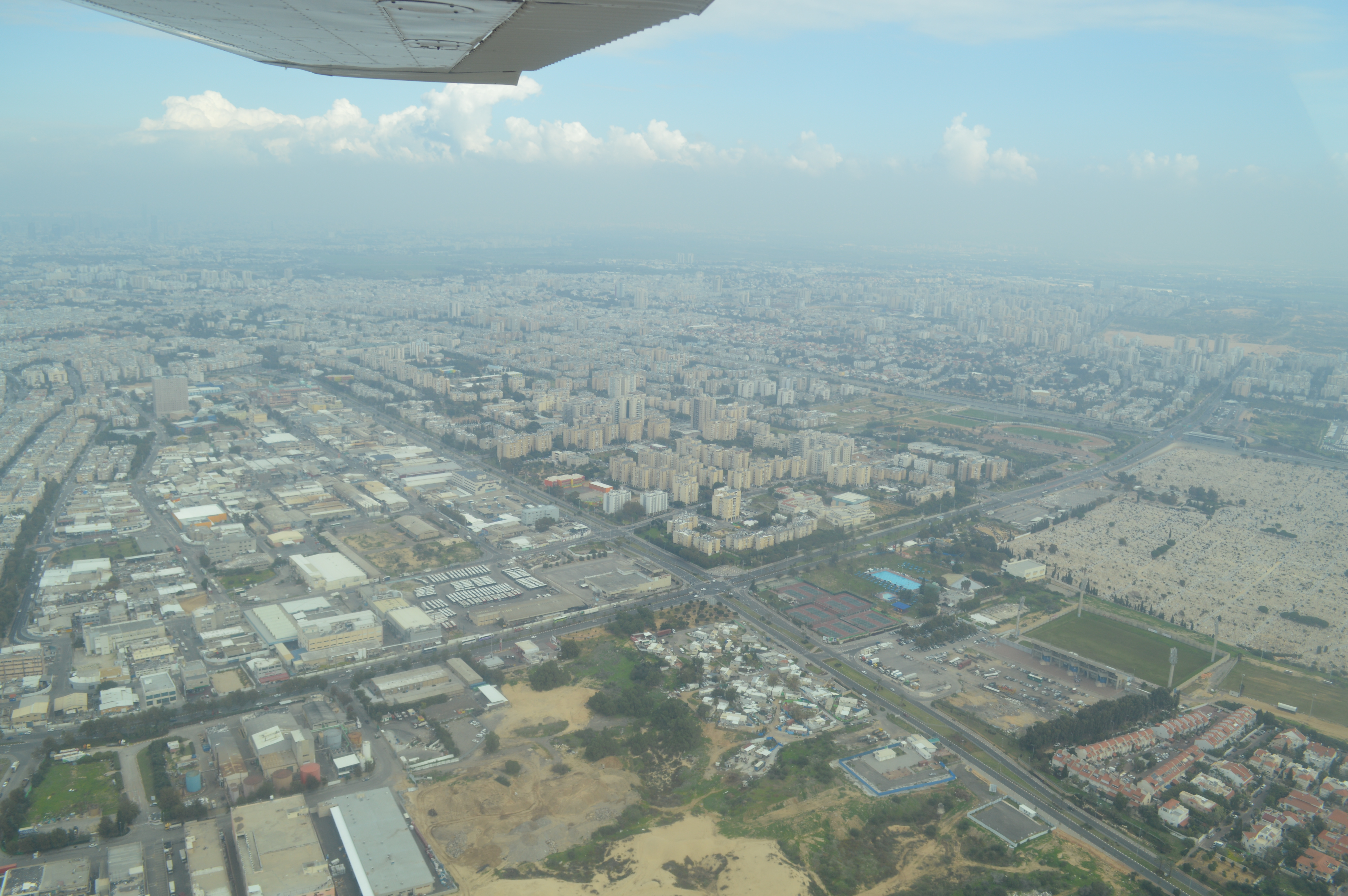 צילום אוויר - חולון, בת ים